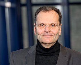 Prof. Dr.-Ing. Thomas Siepmann, FH Aachen